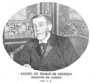 Retrato de Cristóbal Colón de la Cerda, recogido en la revista española Nuevo Mundo.